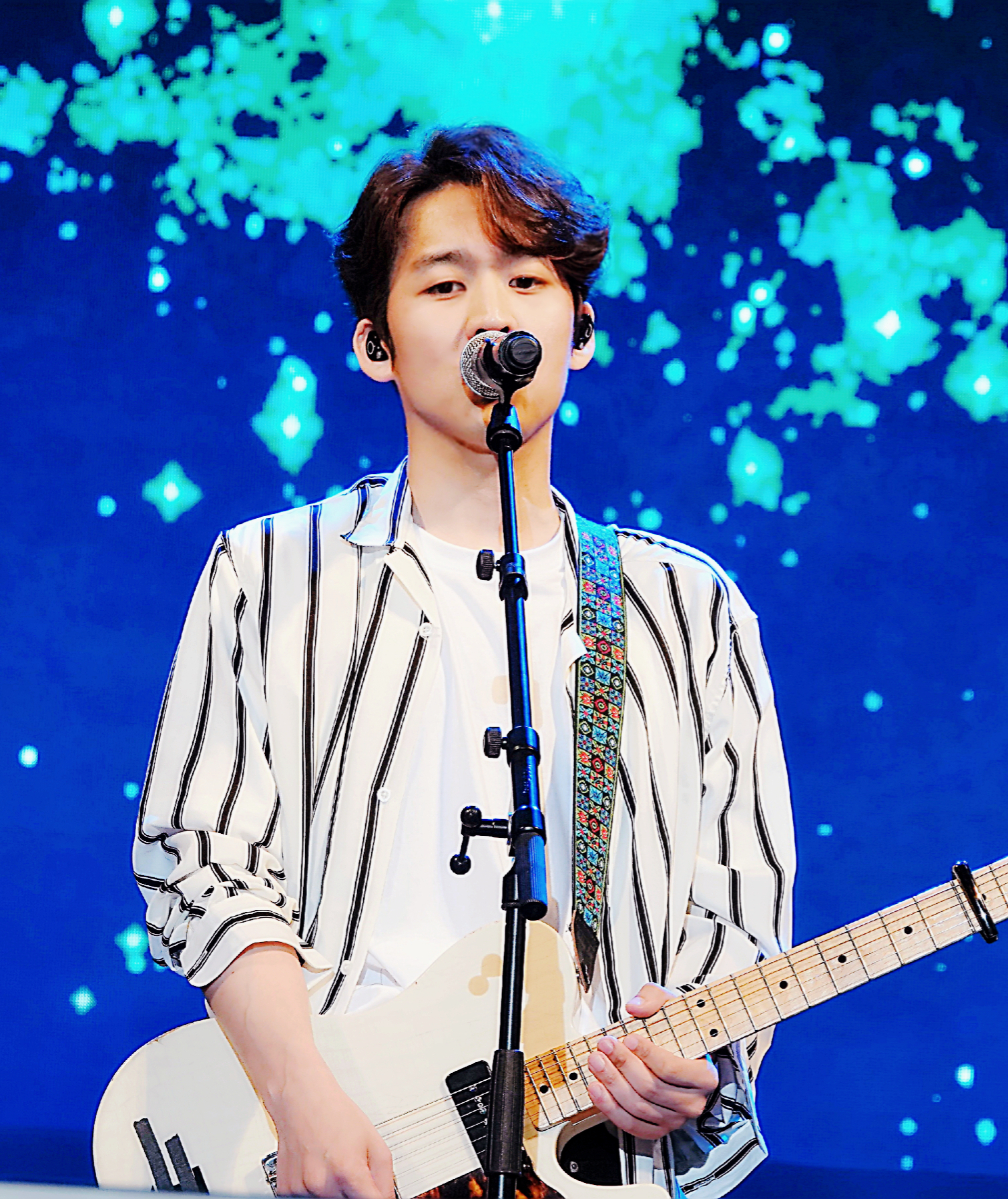 하동균 2019년 봄